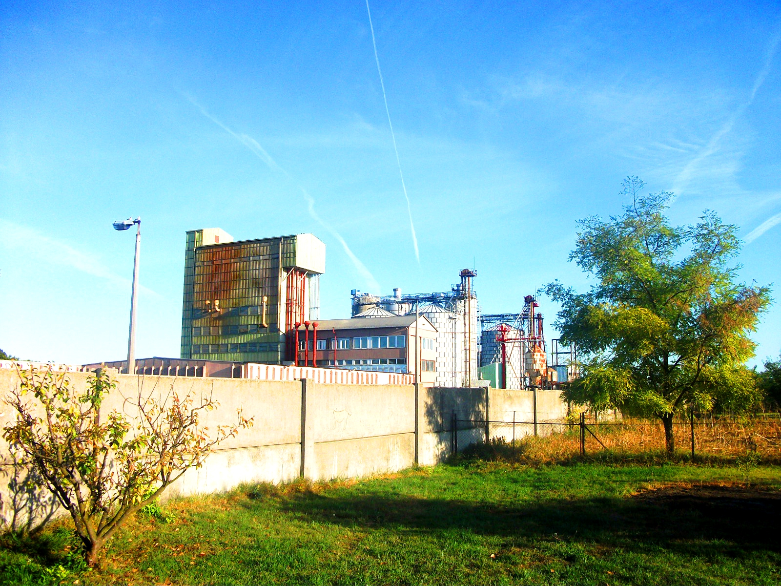 A Cargill cégcsoportba tartozó Provimi gyára Zichyújfaluban.